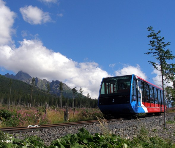 Osada Starý Smokovec, lanovka z Hrebienka